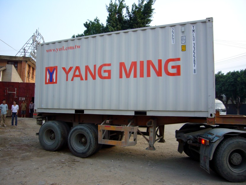 20 ft container